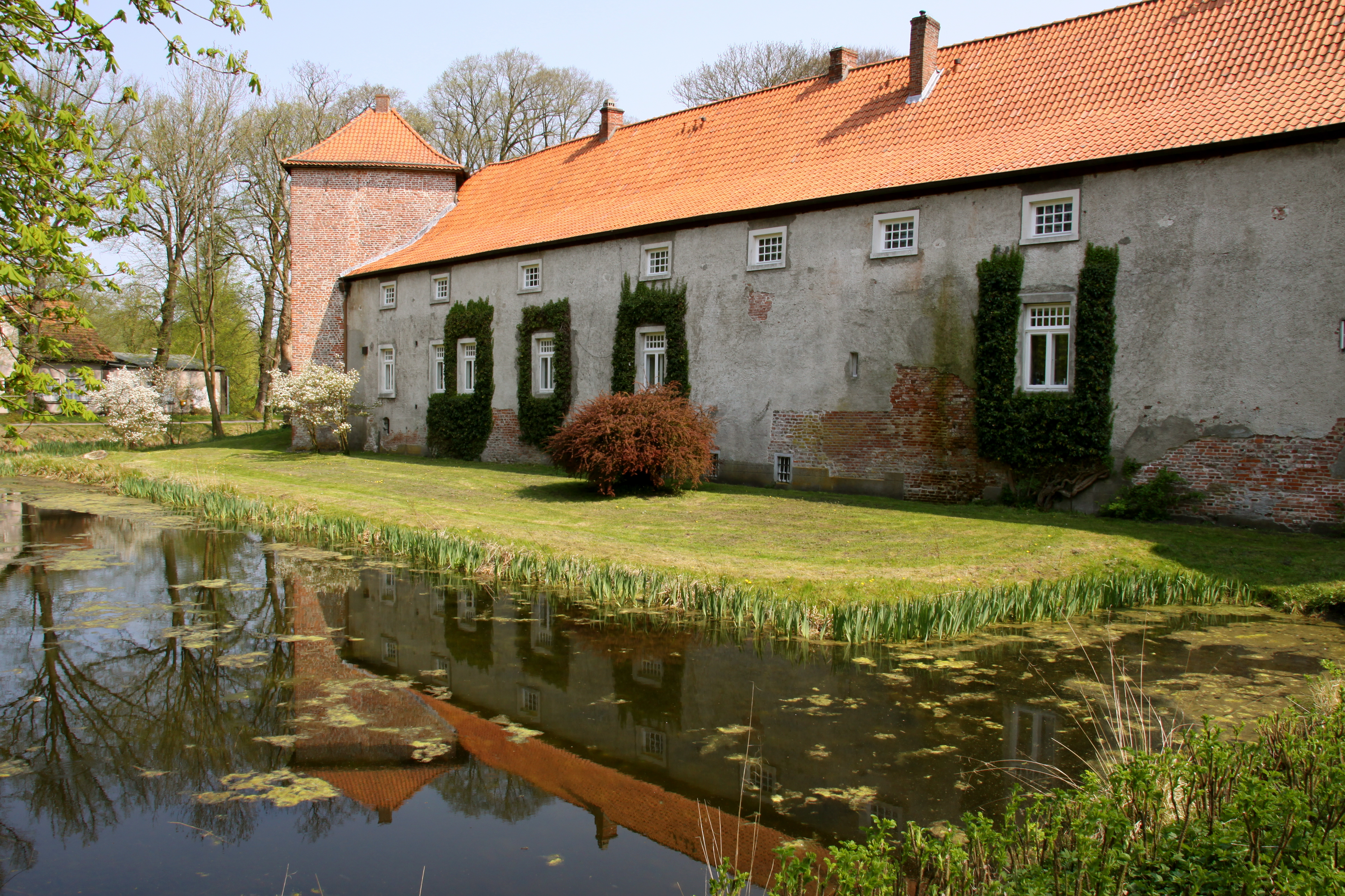 Burg Berum Vorburg